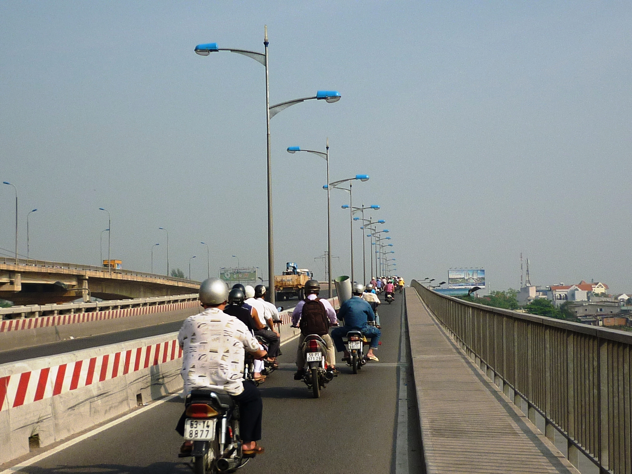 Cầu Bình Triệu 1 hướng từ quận Bình Thạnh về quận Thủ Đức